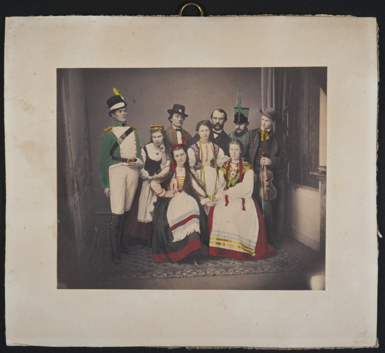 Taiteilijaseuran vuosijuhla 5.2.1866, tanssiryhmä, henkilöt: 1. Anders Thiodolf, 2. Johannes Gripenberg, 3. herr Karl Collan, 4. Lindroos, 5. Degner, 6. Fru Costiander, 7. Maria Collan, 8. Maria Schauman, 9. Ina Lange Forsten.